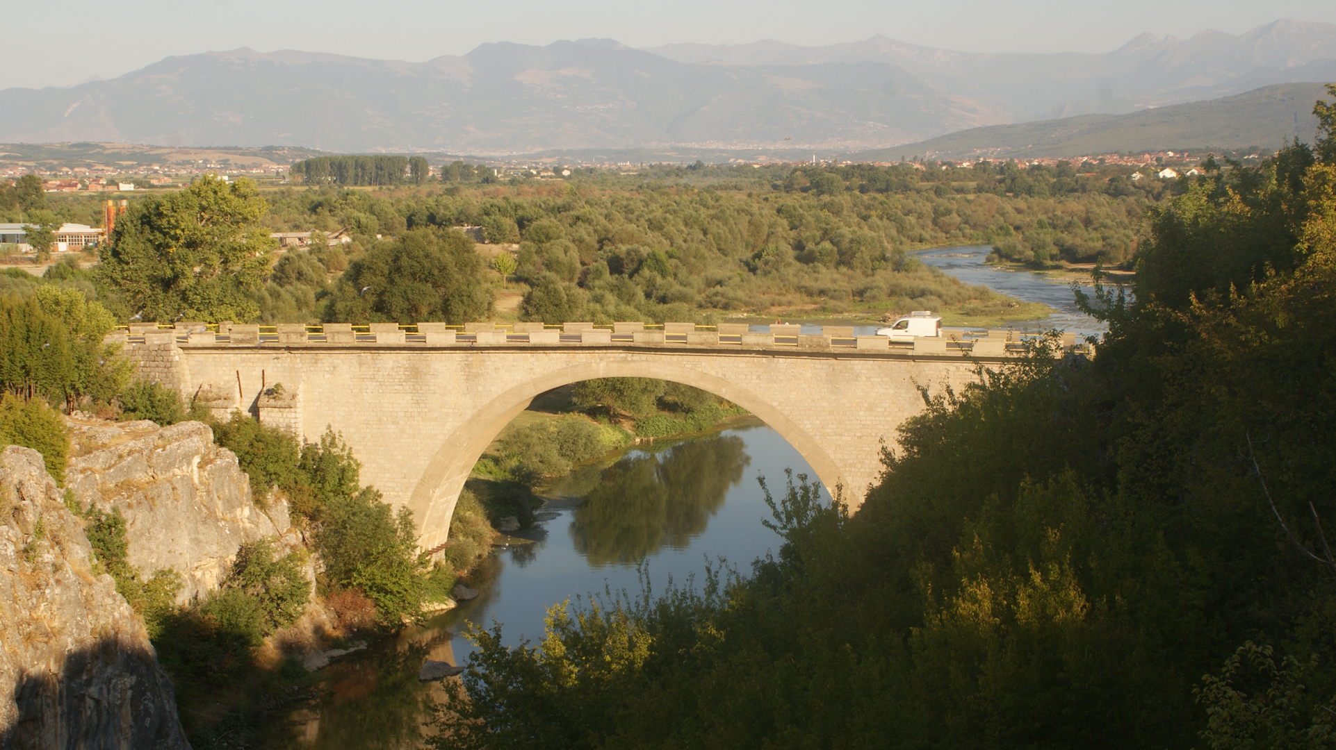 Ura e Fshajt